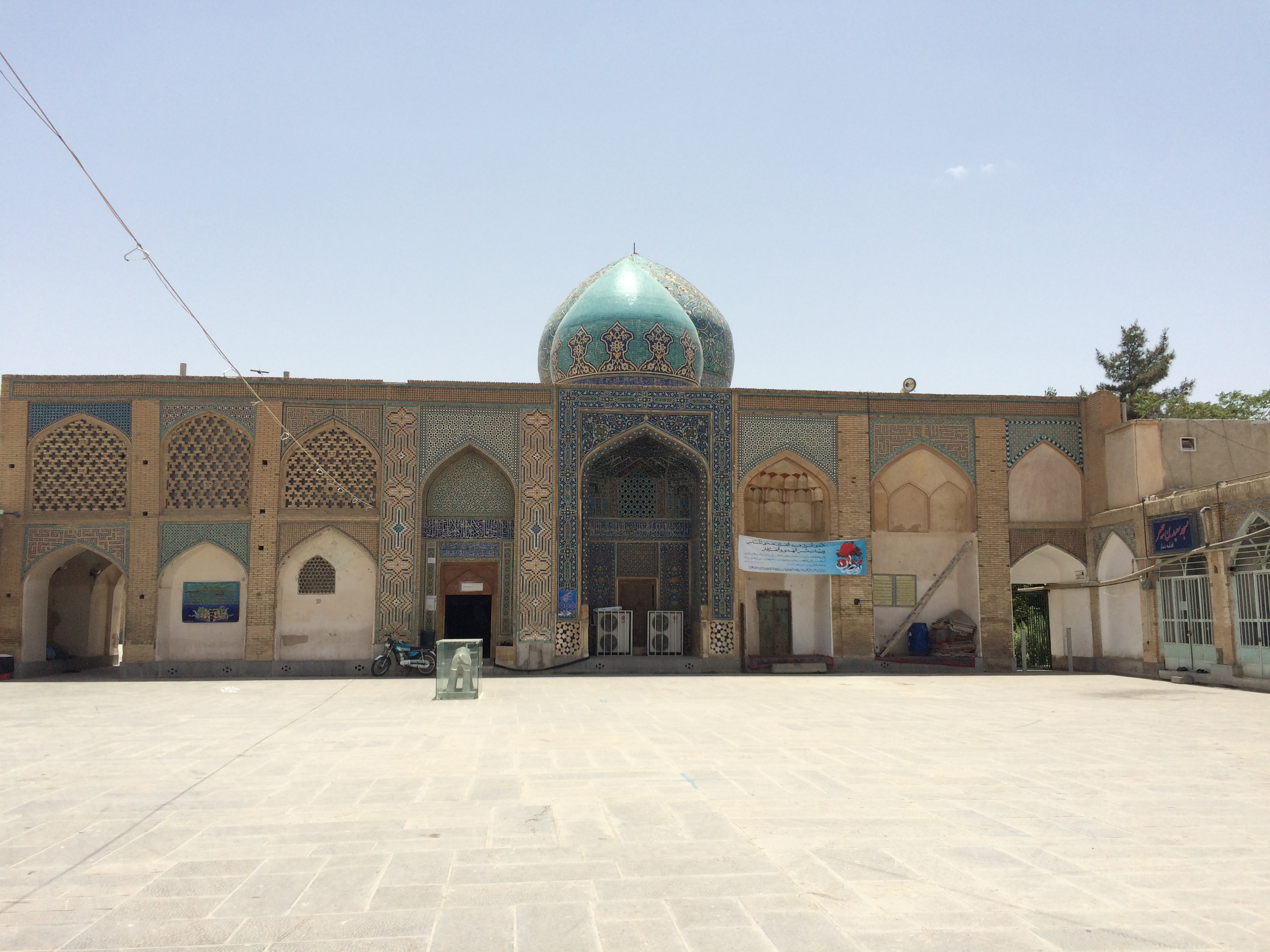 امامزاده درب امام